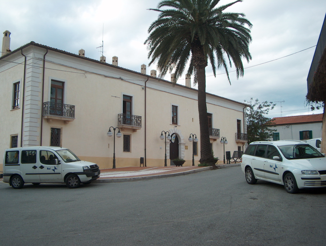 Palazzo Barracco, sede del Municipio di(KR)